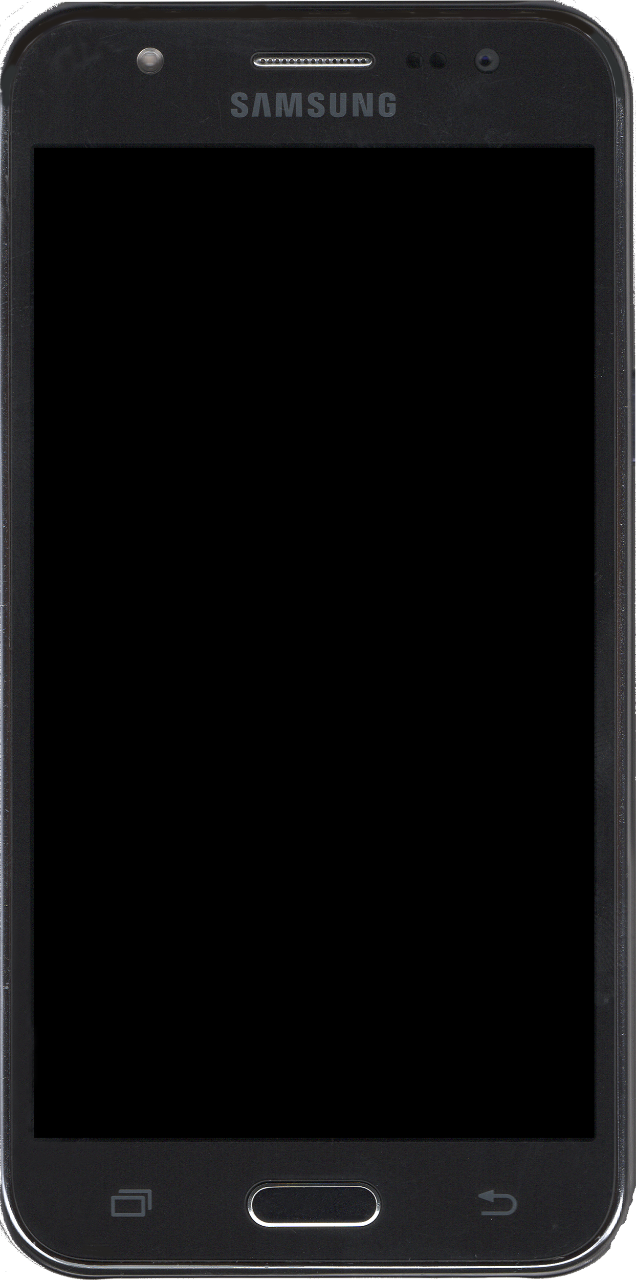 Samsung Galaxy J5 SM-J500M